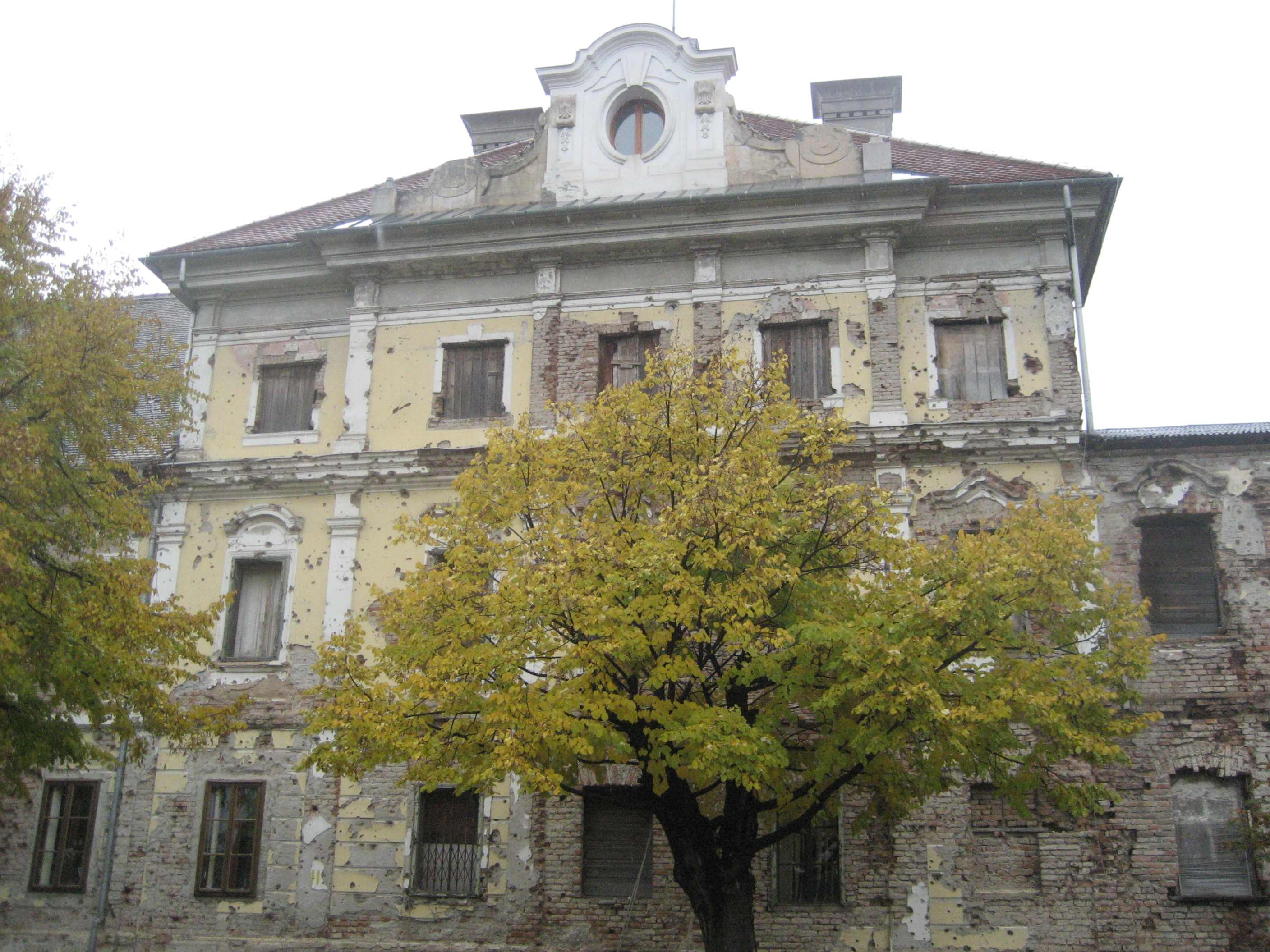 Castle Eltz, Vukovar, Croatia